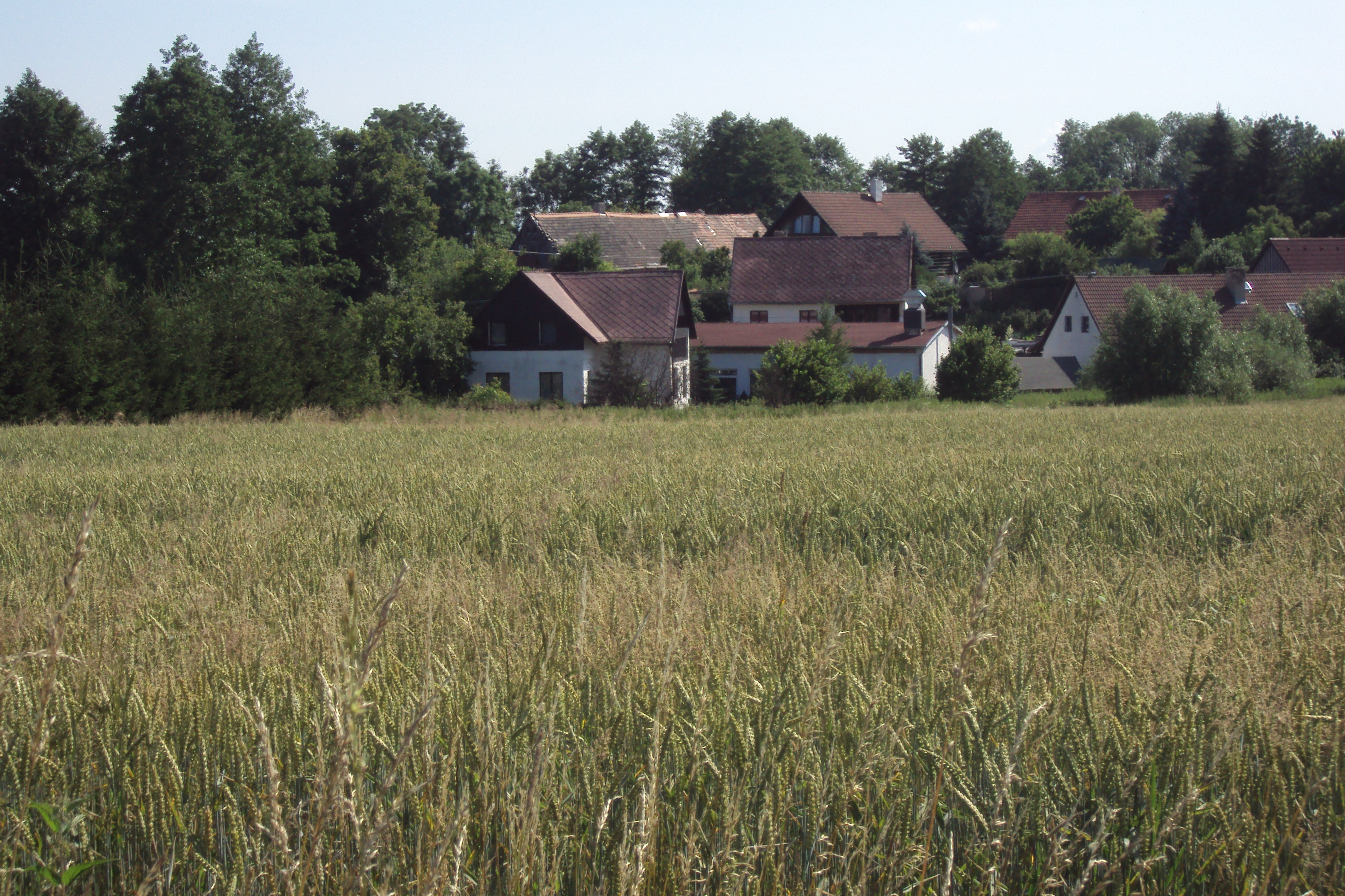 Obec Litice na Českolipsku